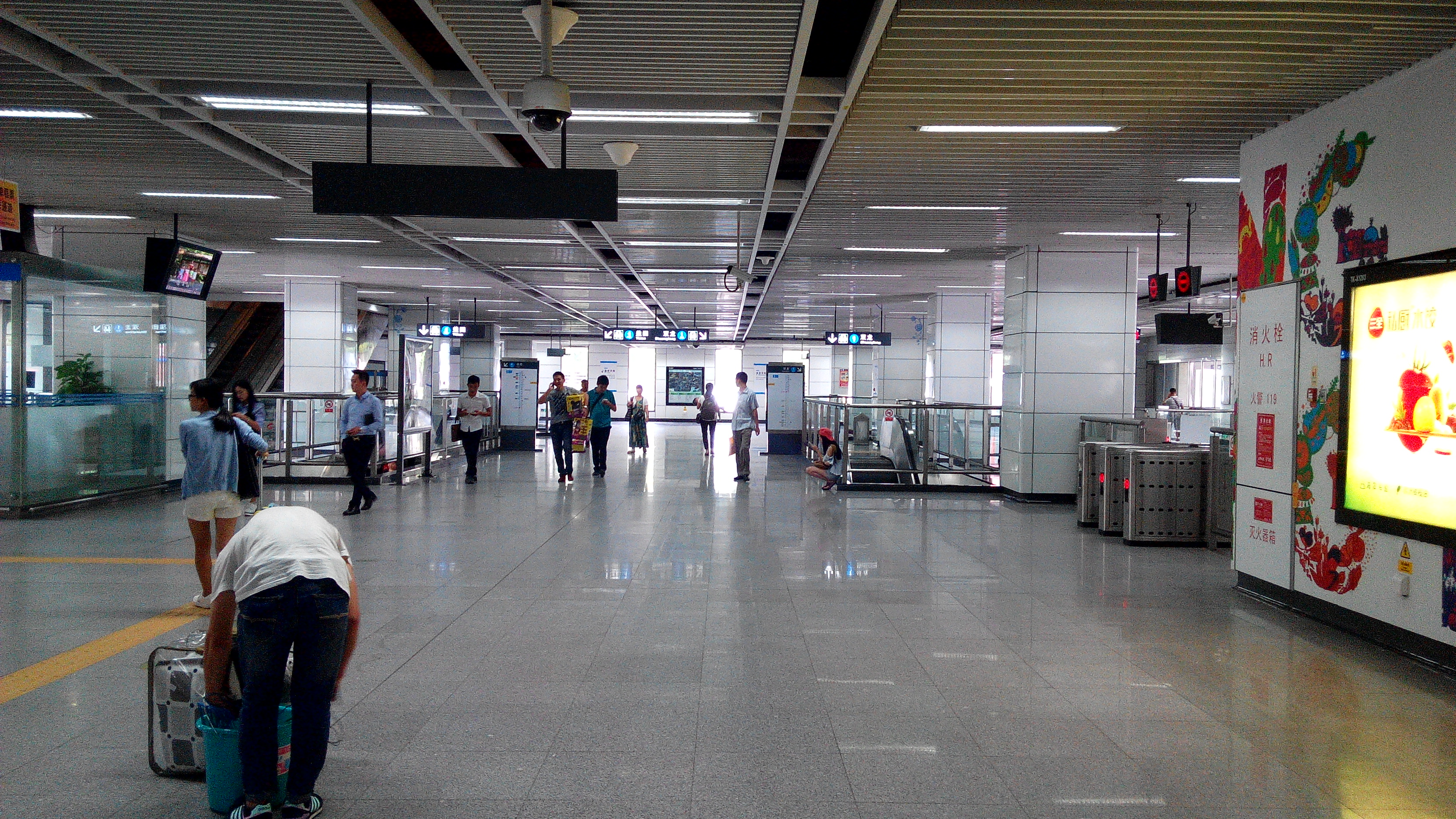 深圳地铁三号线 塘坑站大堂